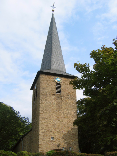 evangelische Dorfkirche Volmarstein, Hauptstr. 36, Wetter-Volmarstein; straßenseitiger Westturm von 1752 This is a photograph of an architectural monument.